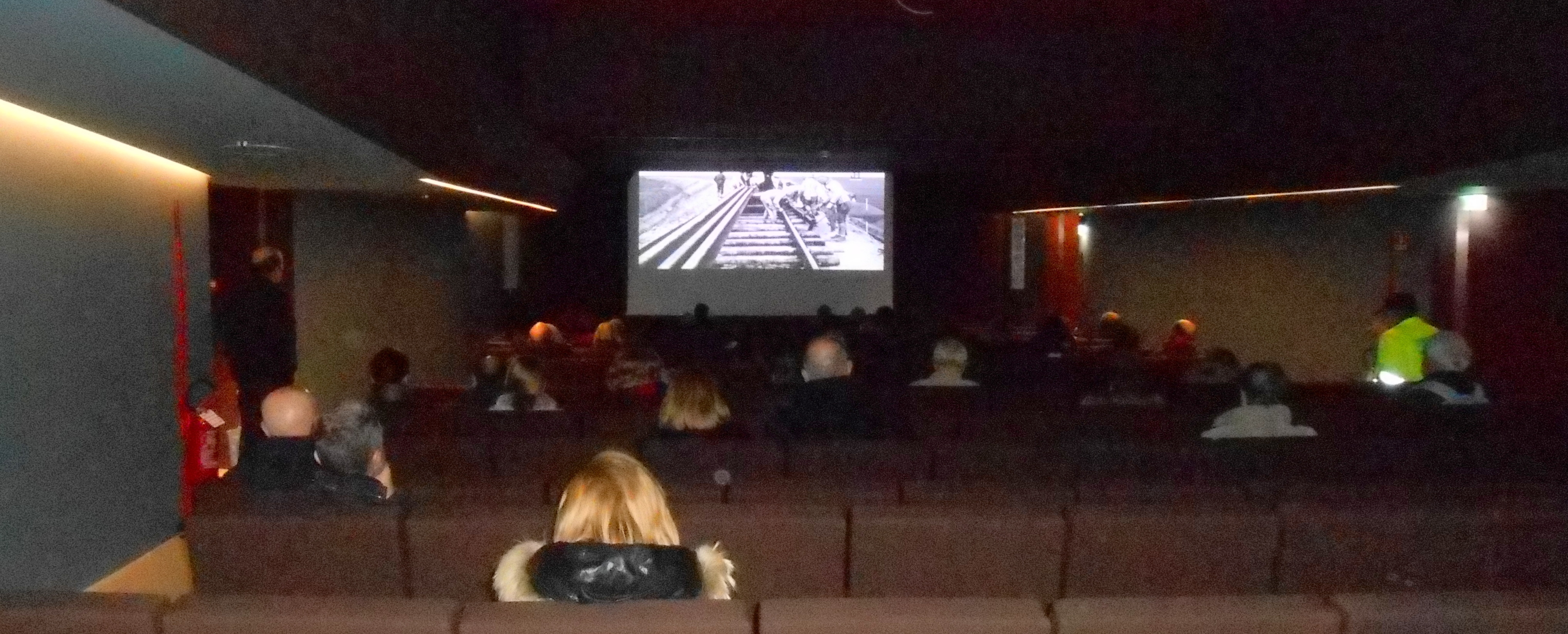 Auditorium del Memoriale della Shoah di Milano